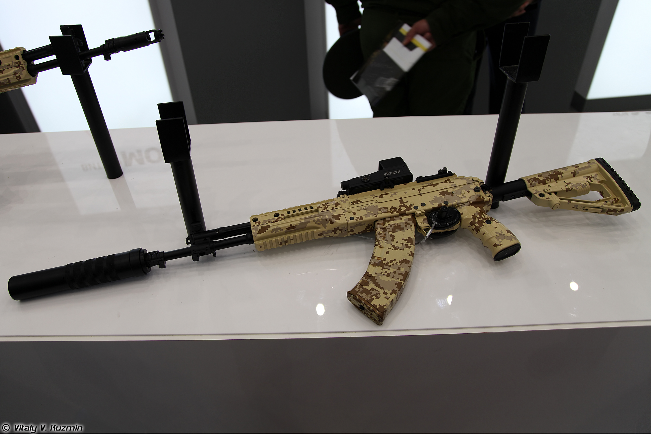 7,62х39 автомат АК-15 6П71